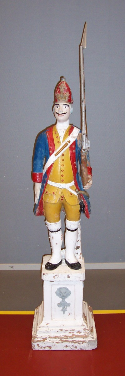 It soldaatsje fan Barrahûs (Wurdum, Iepen Monumintendei 2007)